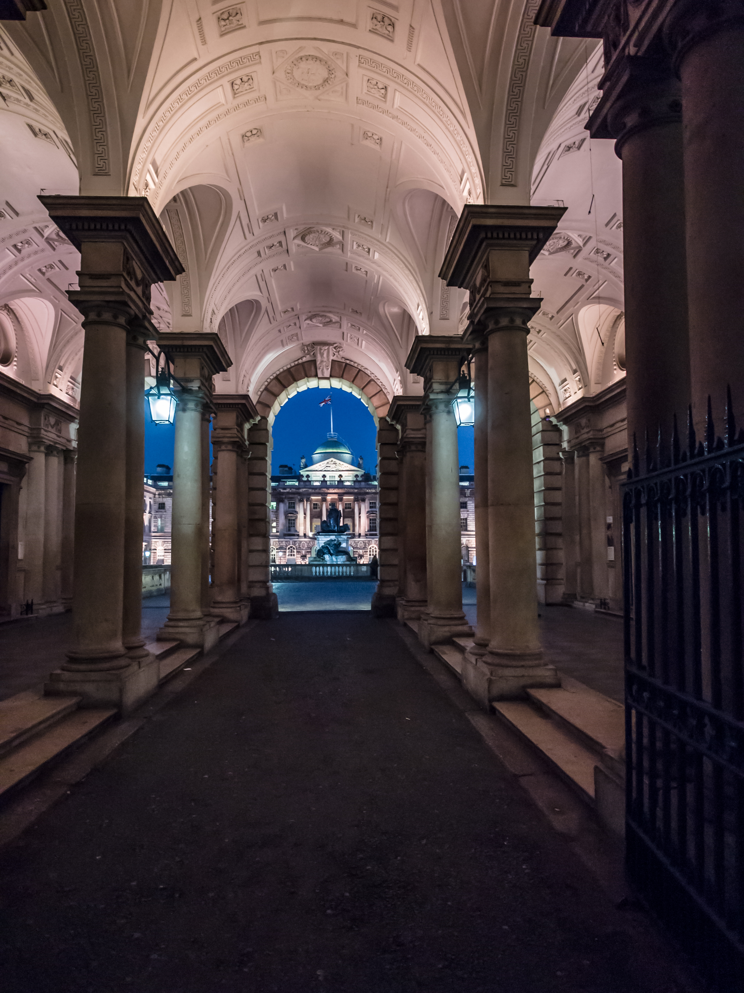 By night